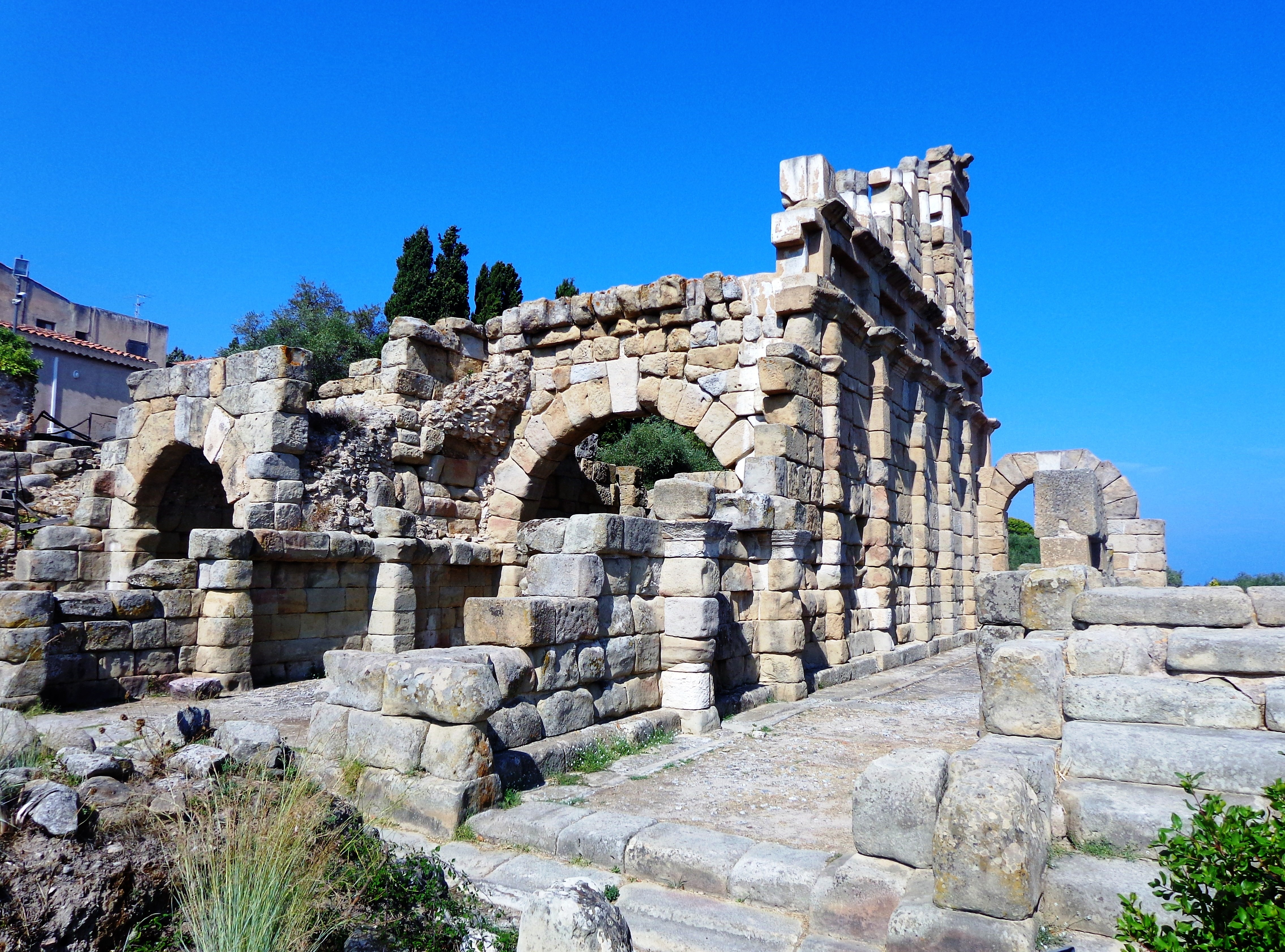 Gymnasium. 08 settembre 2012 (Escursione Tindari, Santuario e area archeologica). Scatto fotografico altresì presente negli album caricati sui profili personali di Facebook, Panoramio, Google, etc.